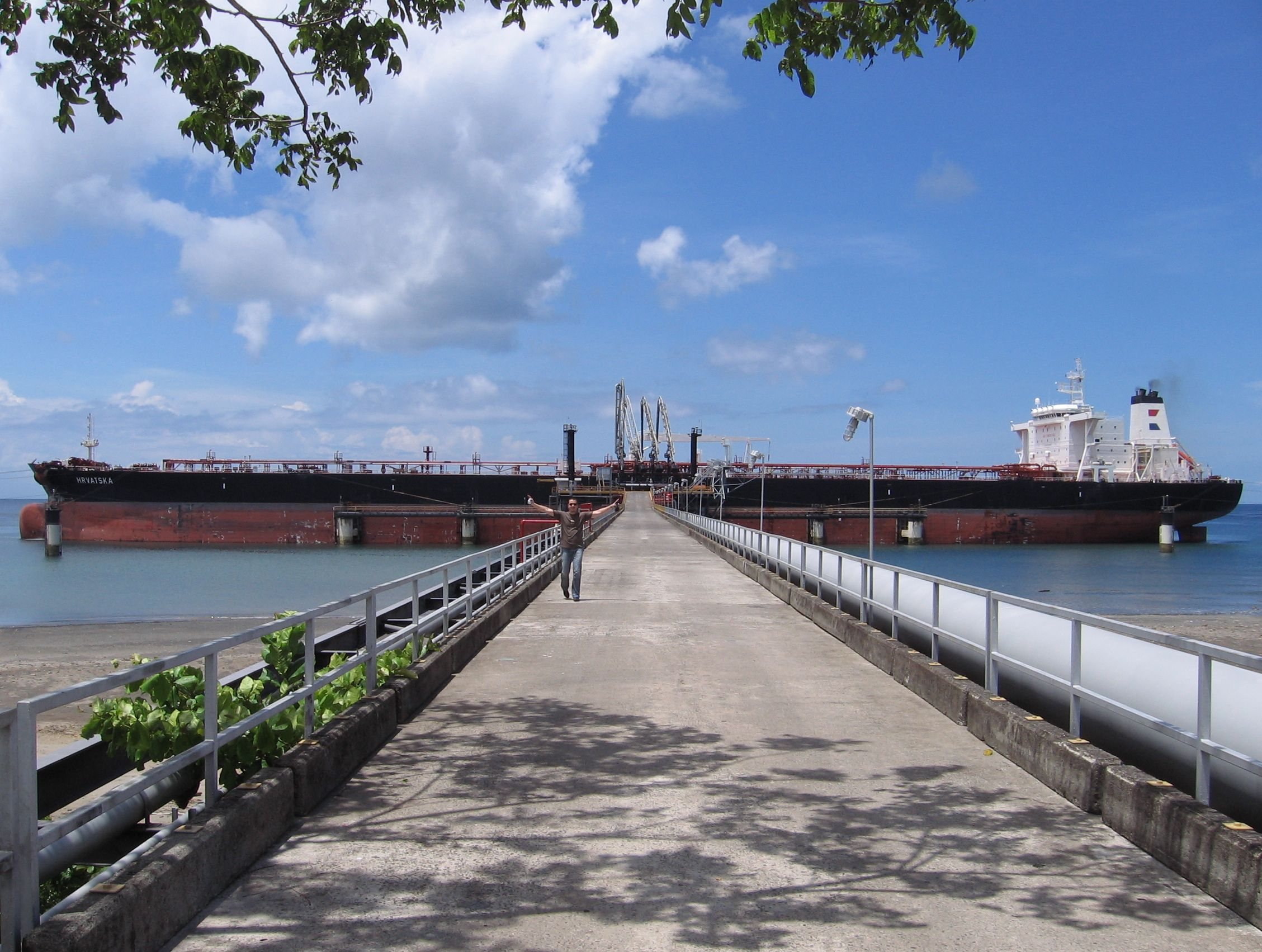 Puerto Armuelles